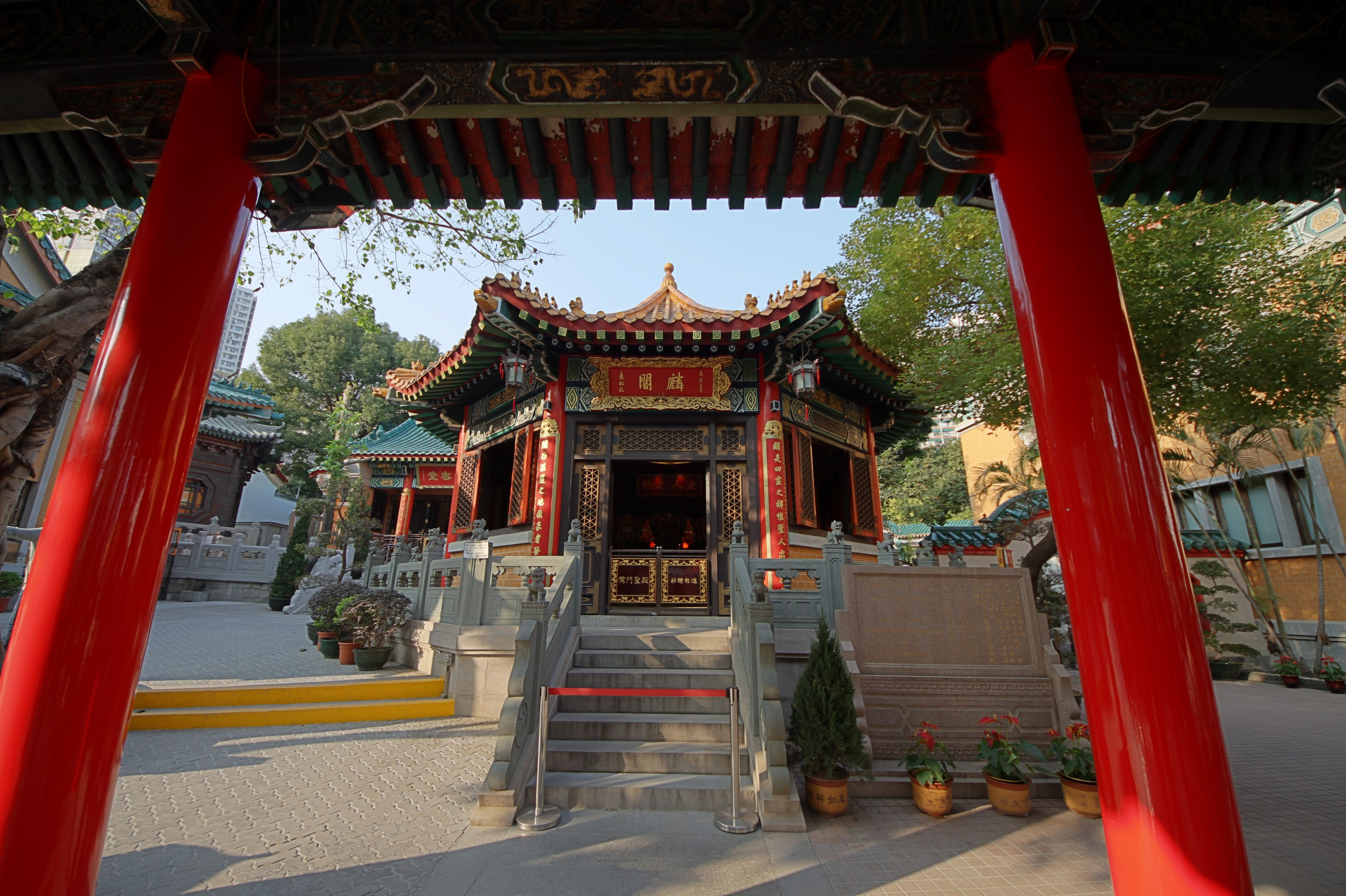 Chuk Un, Hong Kong